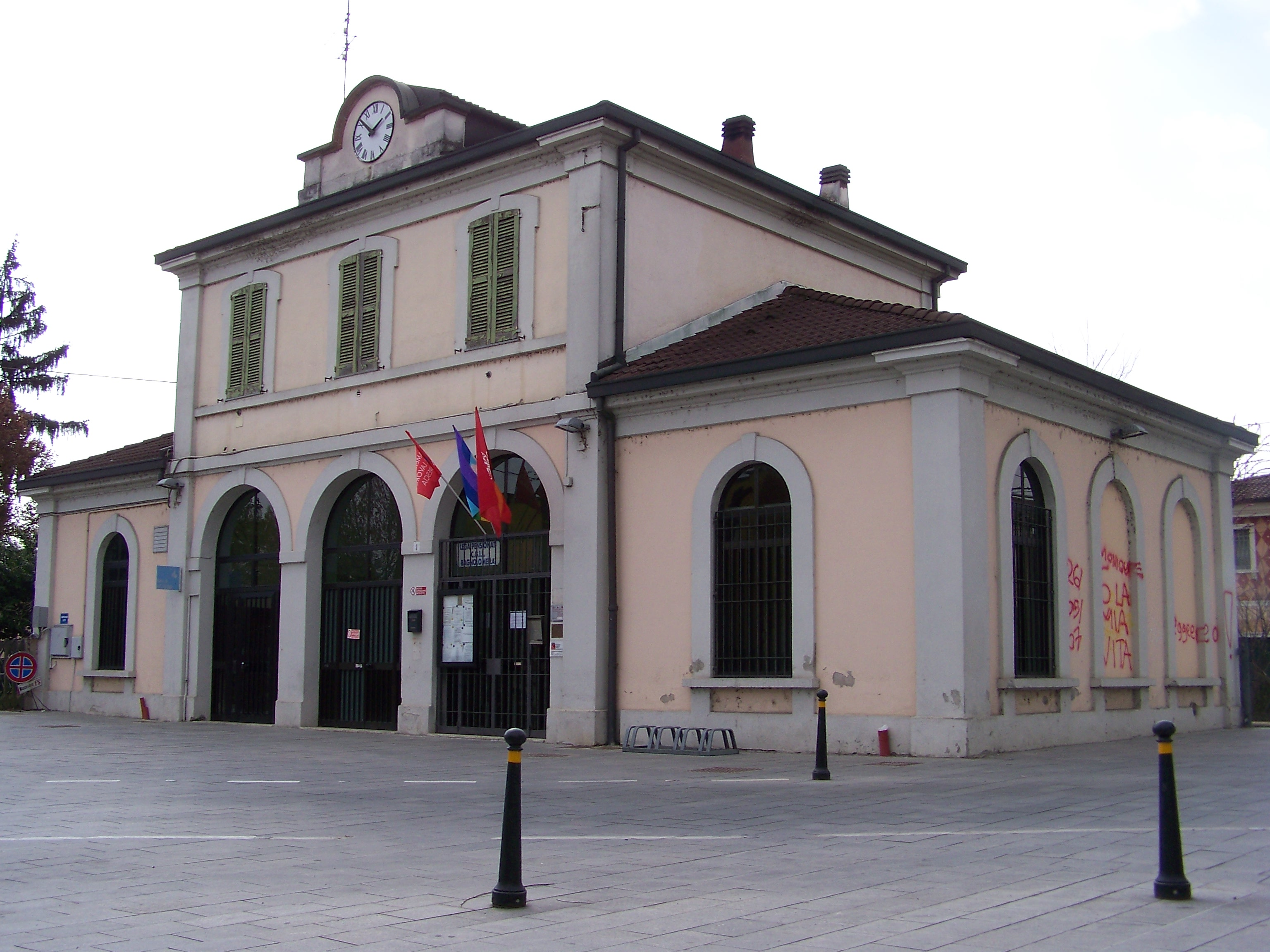 Lato campagna del fabbricato viaggiatori della Stazione di Bagnolo Mella lungo la ferrovia Brescia-Cremona